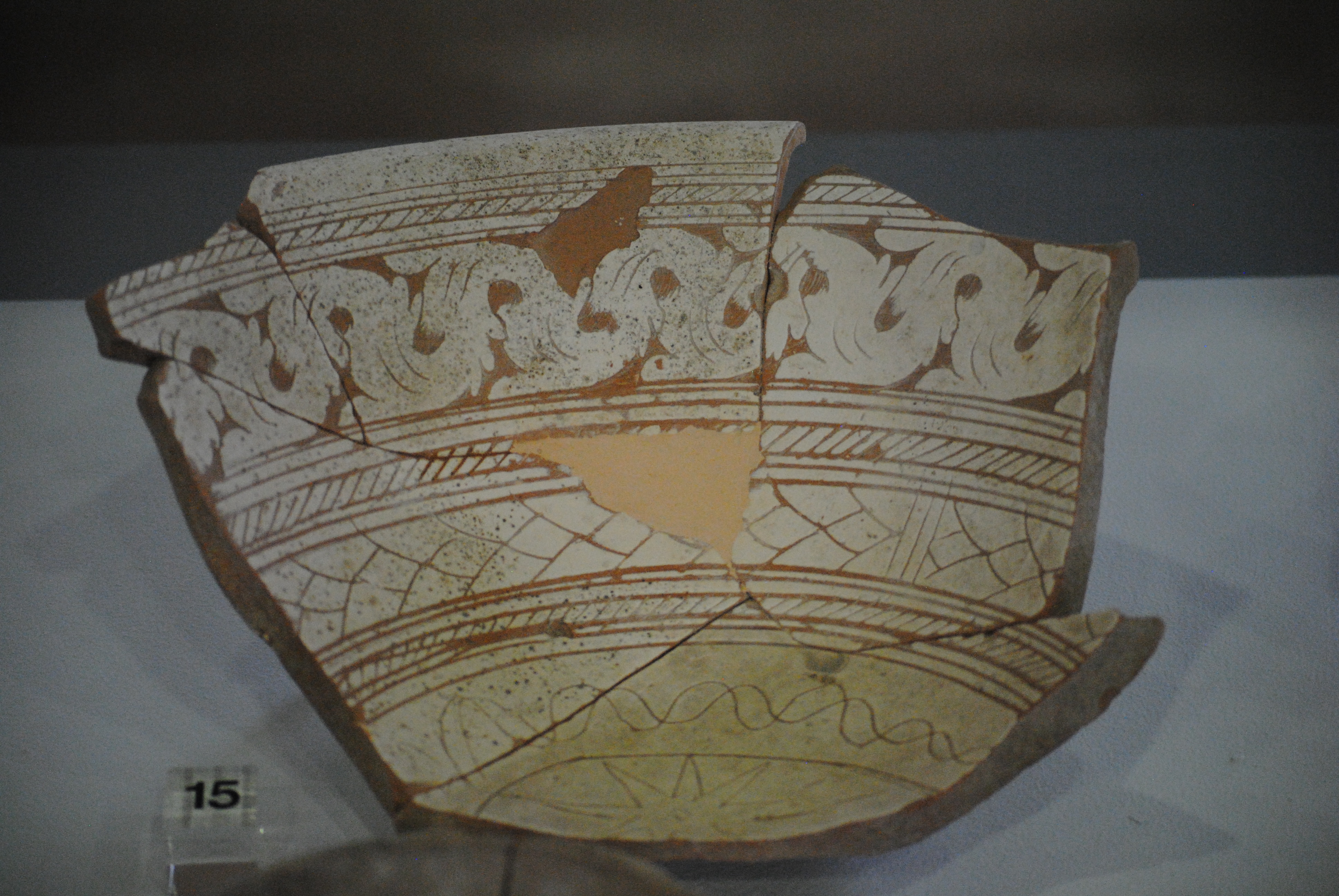 Catino ingobbiato e graffito a fondo ribassato sulla fascia, a punta nel cavetto - recuperato durante lo scavo di via Sapienza, Pisa - Museo Nazionale di San Matteo.